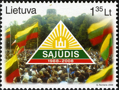 Беларуская (тарашкевіца): Паштовая марка Летувы. Sąjūdis (1988—2008)